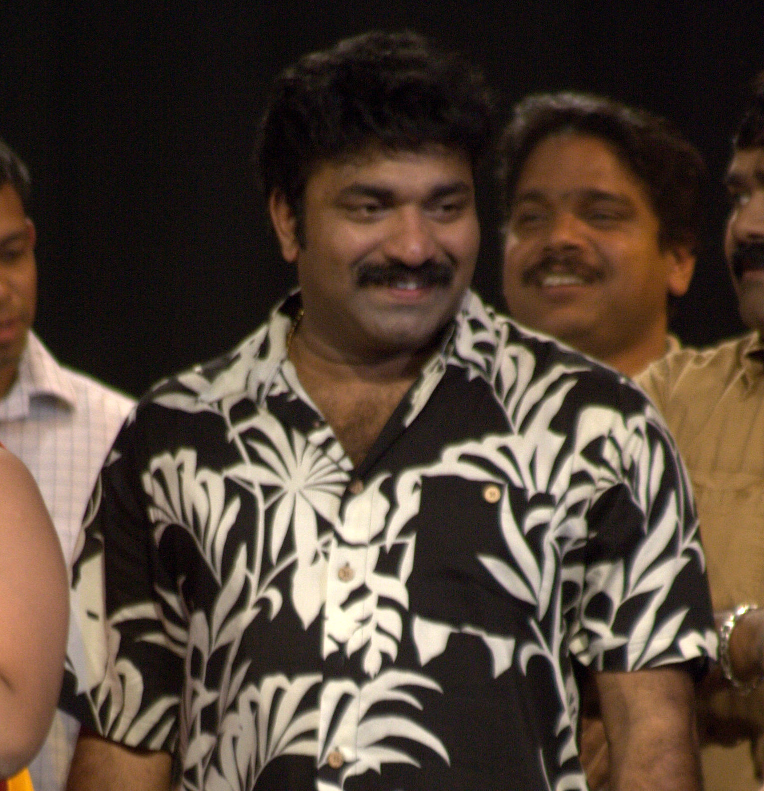 Kottayam Nazir Stage Show , 2008 May